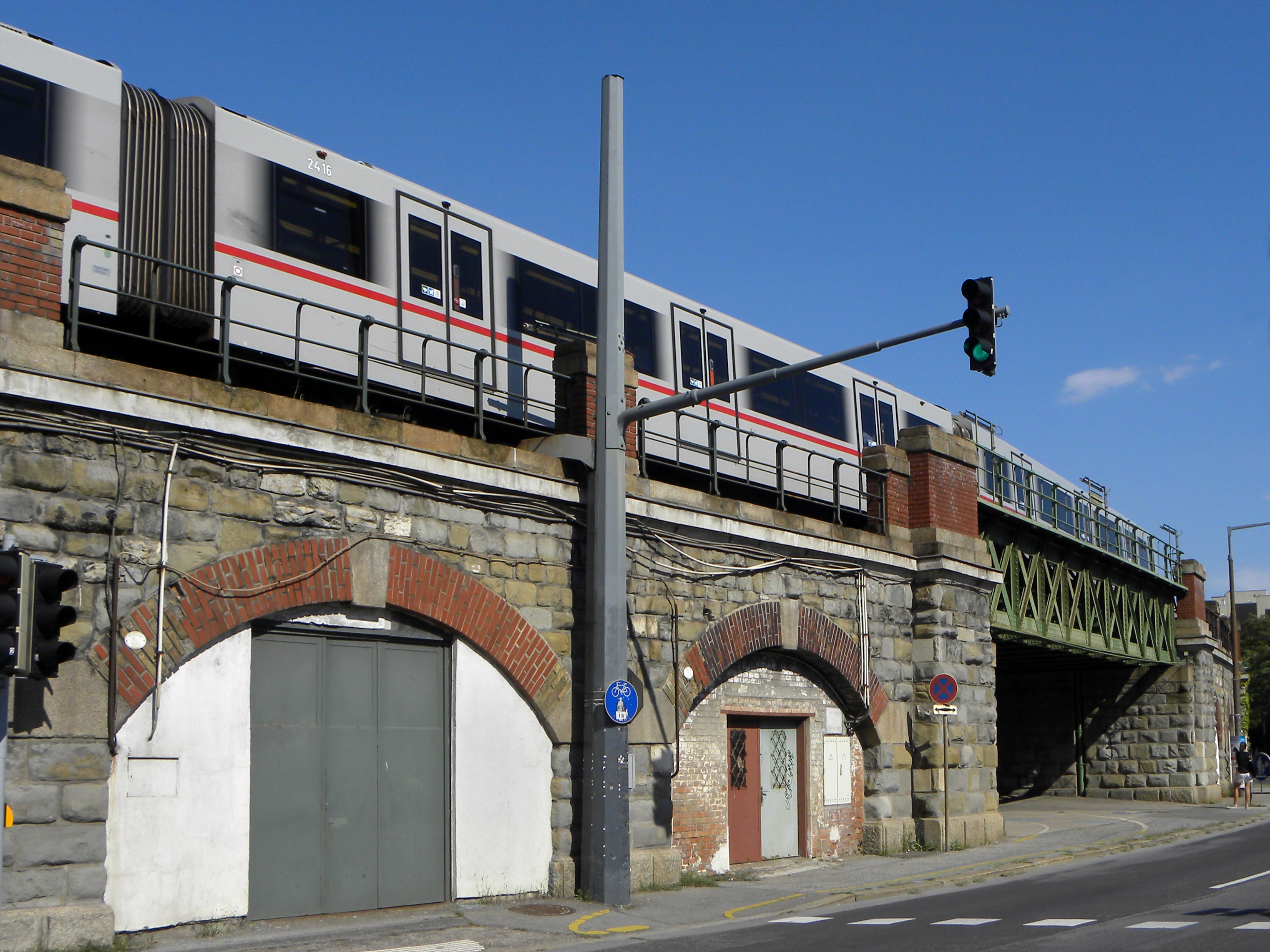 Die Wiener U-Bahnlinie U4 bzw. ehemalige Stadtbahn Höhe Zufferbrücke